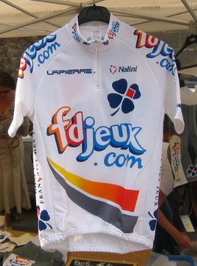 Maillot du tour de France cycliste de l'equipe Francaise des Jeux